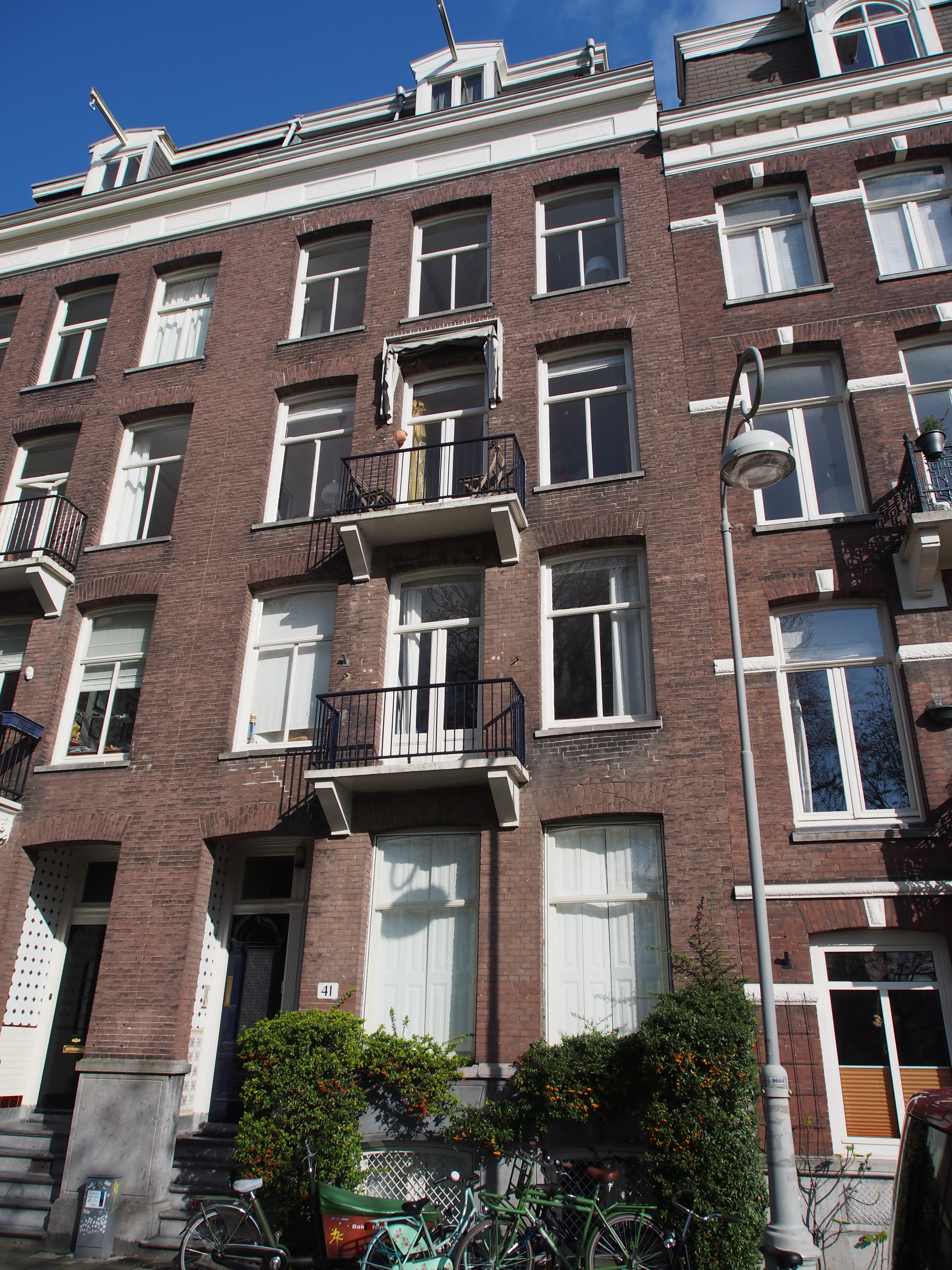 Monument in Amsterdam.